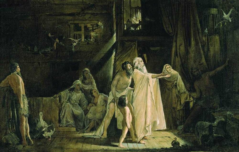 Ноев ковчег. 1882. Государственный Русский музей, Санкт-Петербург